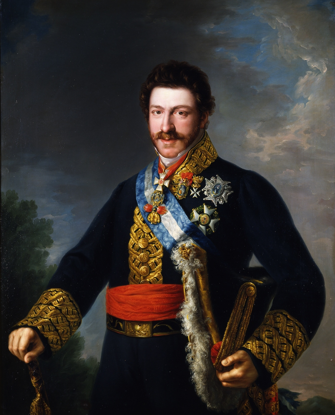 Retrato del infante Francisco de Paula de Borbón (1794-1865), duque de Cádiz y el menor de los hijos del rey Carlos IV de España y de la reina María Luisa de Parma.